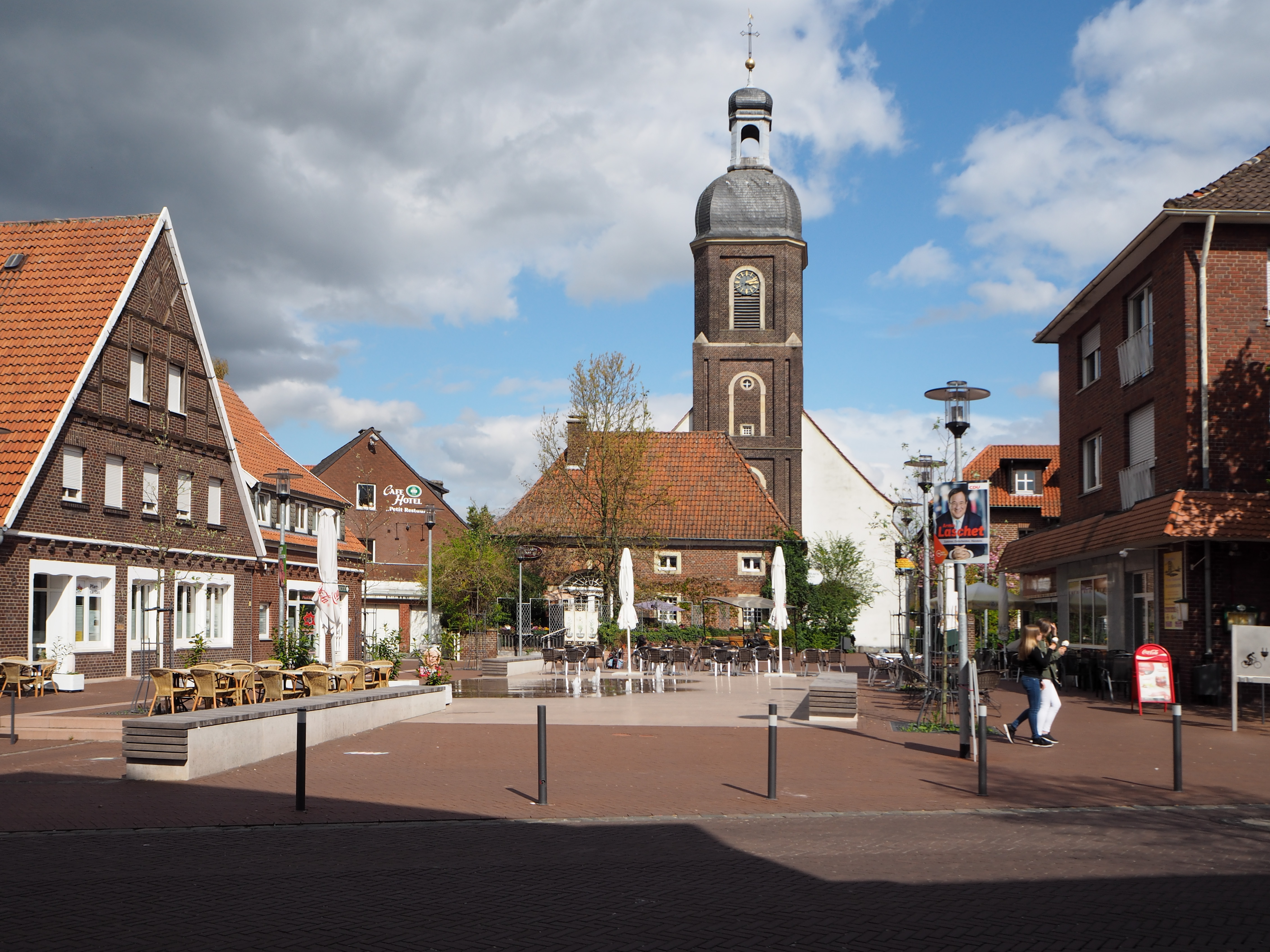 Nordkirchen (NRW), Ludwig-Becker-Platz, Foto: April 2017